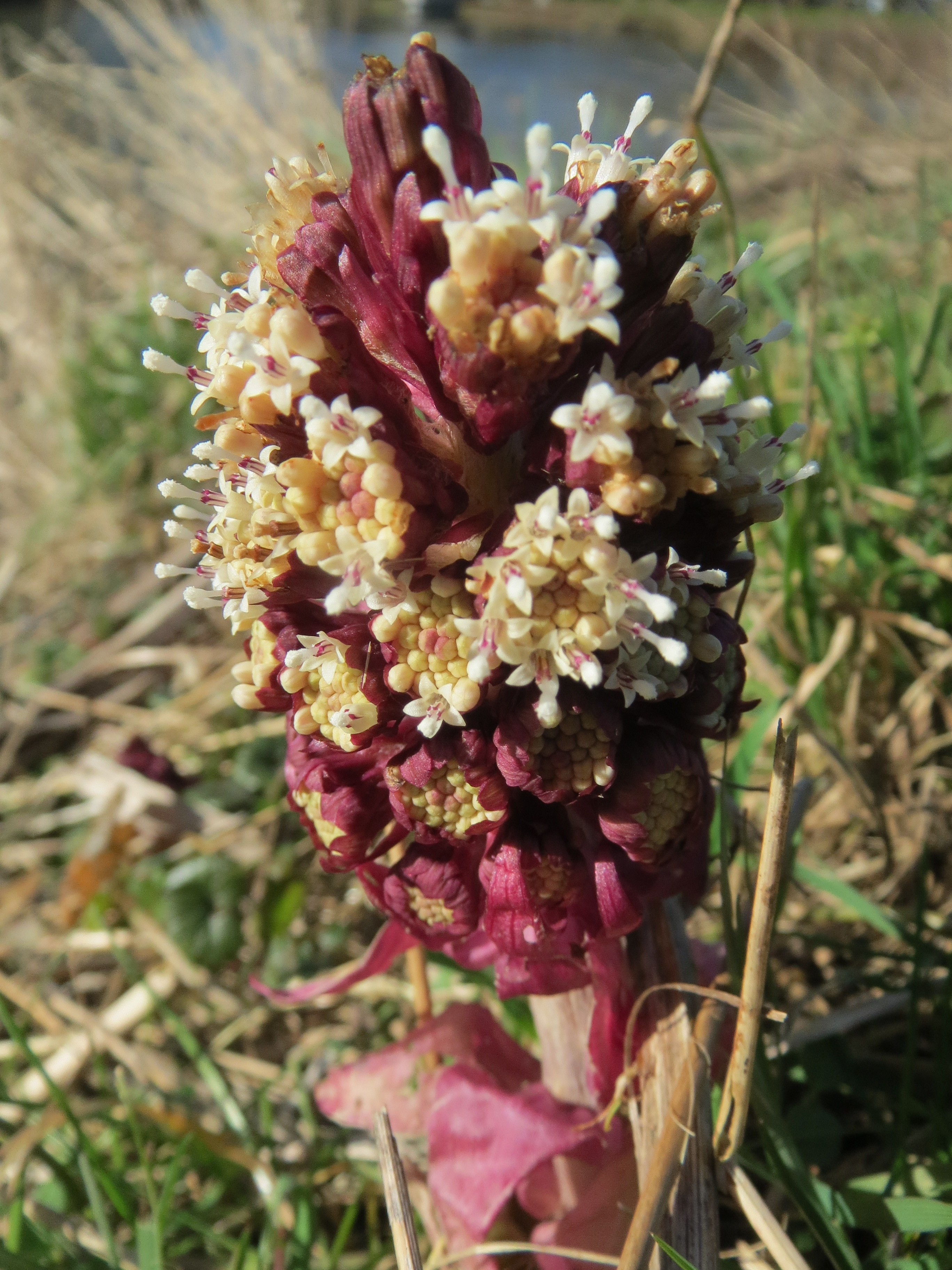 Gewöhnliche Pestwurz (Petasites hybridus) am Staden in Saarbrücken